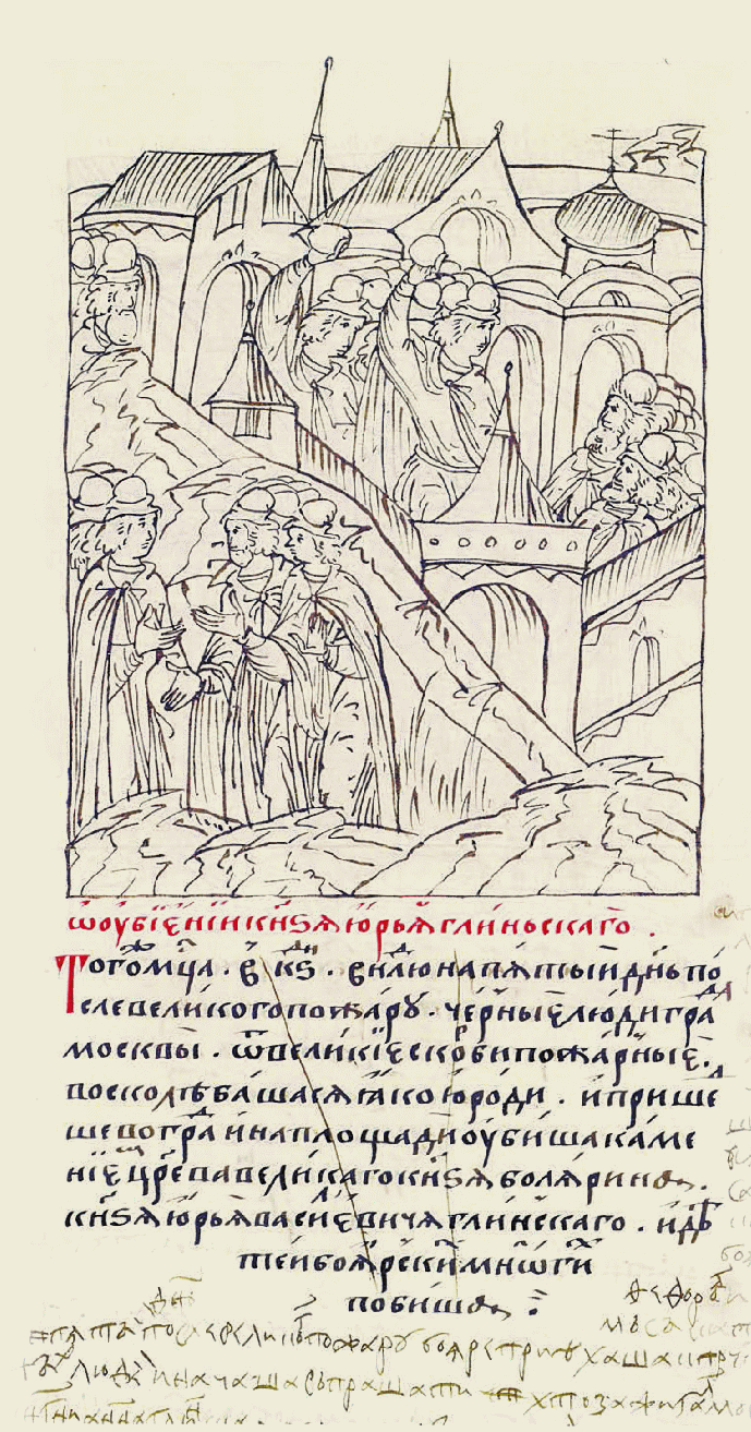 Миниатюра из Царственной книги. Москва. 1550–1560-е гг. Об убийстве князя Юрия Глинского. /В том же месяце в 26 день в воскресе- нье, на пятый день после великого по- жара, простолюдины города Москвы от великой скорби из-за пожара взбунто- вались словно безумные, пришли в град и на площади забили камнями царева великого князя боярина князя Юрия Васильевича Глинского и детей боярских многих побили/. И после пожара на 2 день приехал царь и великий князь навещать ми- трополита Макария в Новое, и с ним были бояре, и вражьим наветом начали говорить, что волшебством человече- ские сердца вынимали и в воде мочи- ли, и той водою кропили, и оттого вся Москва погорела. Начали же эти слова произносить духовник царя и великого князя протопоп Благовещенский Федор и боярин князь Федор Скопин-Шуй- ский, и Иван Петров Федоров. И царь и великий князь велел боярам произве- сти розыск. Бояре приехали к соборной церкви Успения Богородицы на пло- щадь и собрали черных людей, и начали вопрошать: кто поджег Москву? Они же начали говорить, что княгиня Анна Глинская со своими детьми и людьми волхвовала: вынимала человеческие сердца и клала в воду, и с той водой ездила по Москве и кропила, и оттого Москва выгорела. И говорили черные люди, что в ту пору Глинские у государя находятся в приближении и жаловании, а от их людей черным людям творится насилие и грабеж, они же от того не унимались. А князь Михаил Глинский находился тогда с матерью на государ- ском жаловании в Ржеве; и князь Юрий Глинский тогда приехал, и как услышал такие речи о матери и о себе, пошел в церковь Пречистой (Богородицы). Бо- яре же по своей неприязни к Глинским натравили чернь на него; те же схва- тили князя Юрия в церкви и убили его в церкви, выволокли передними дверя- ми на площадь и за город и положили перед тем колом, на котором казнят. Были же на совете